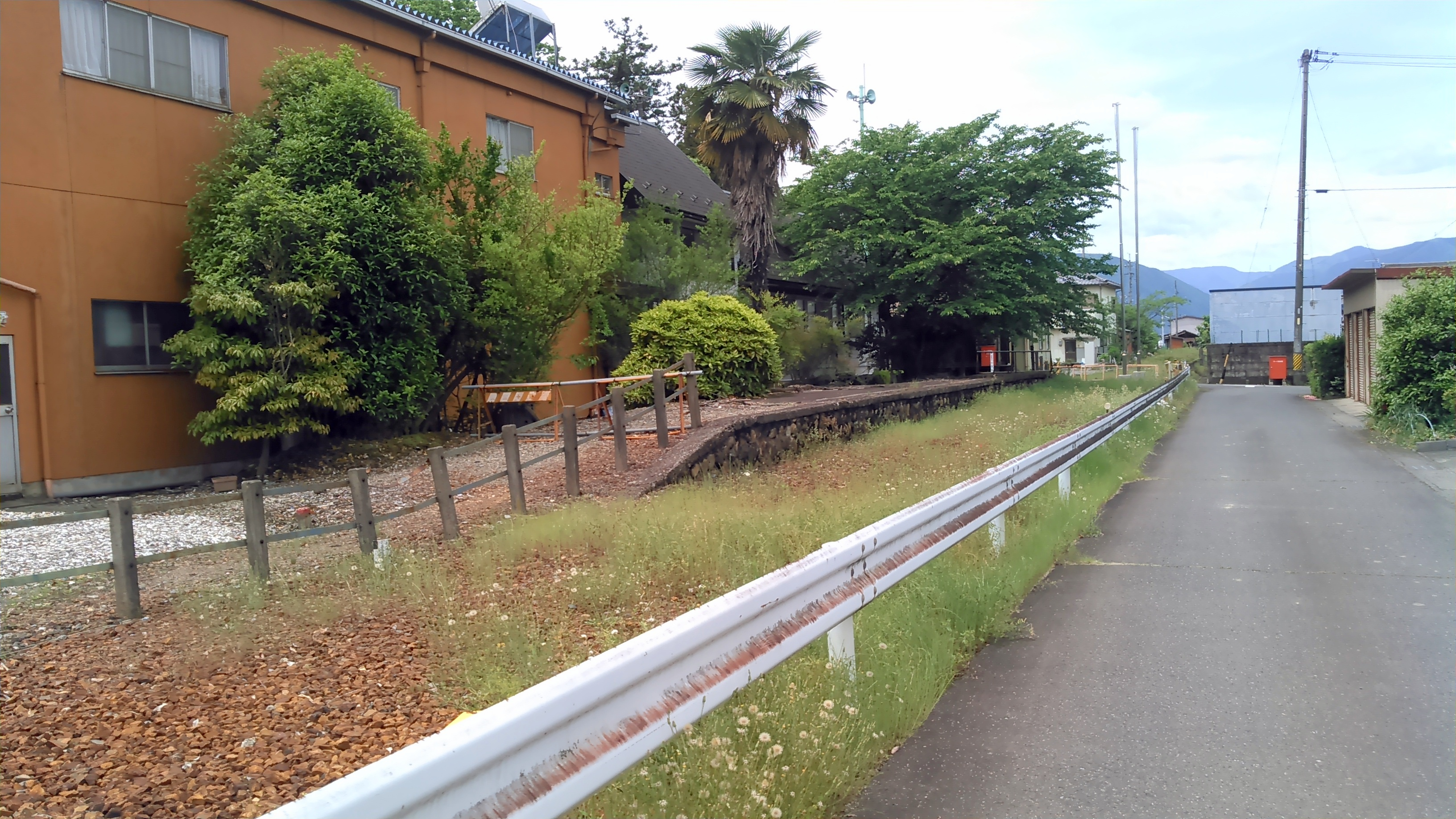 名鉄揖斐線の廃線後のホーム跡。